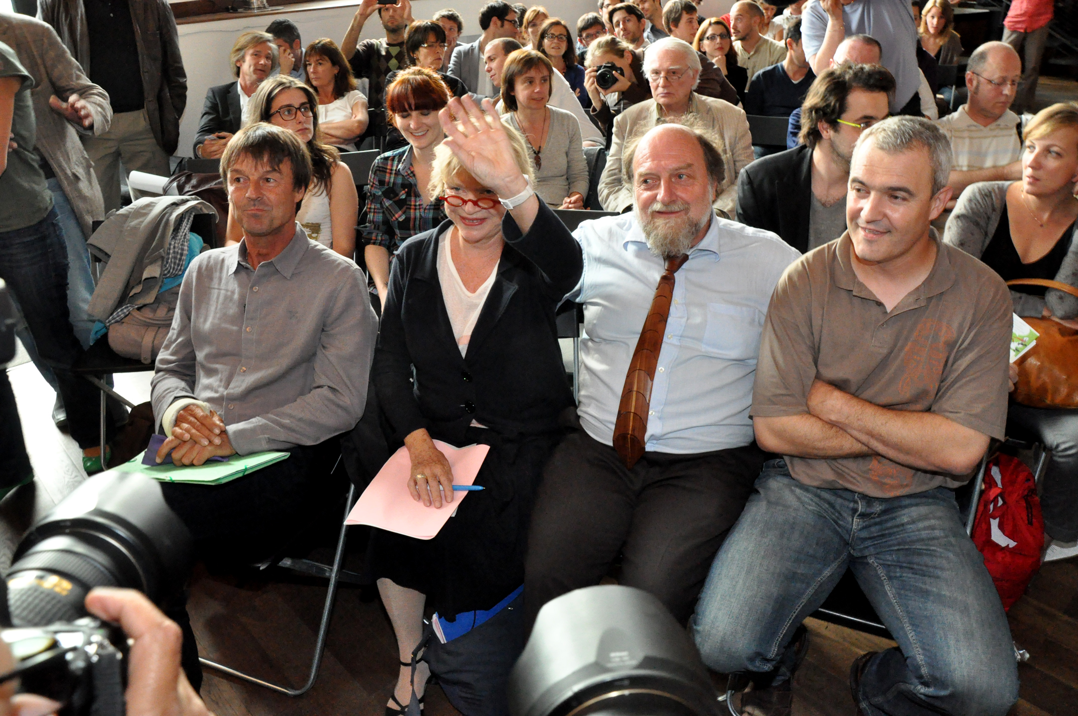 Eva Joly 2012